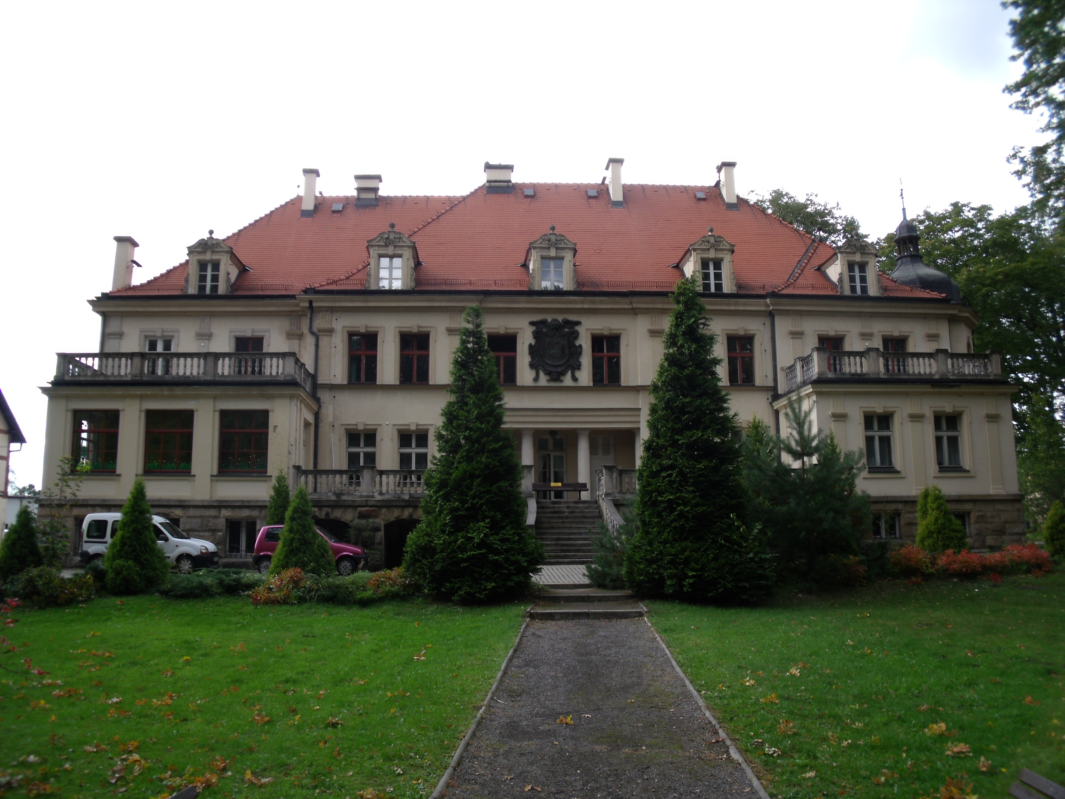 Orzesze Zawiść, ul. Mikołowska 208 - pałac z parkiem (zabytek nr A 726/66 z 15.06.1966)